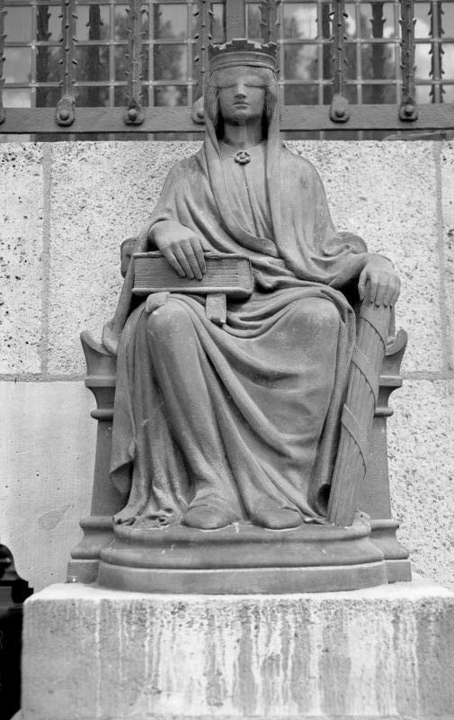 21.6.1991 Gerichtsgebäude in Berlin, die Justitia am Landgericht Berlin, Tegeler Weg, Berlin-Charlottenburg.